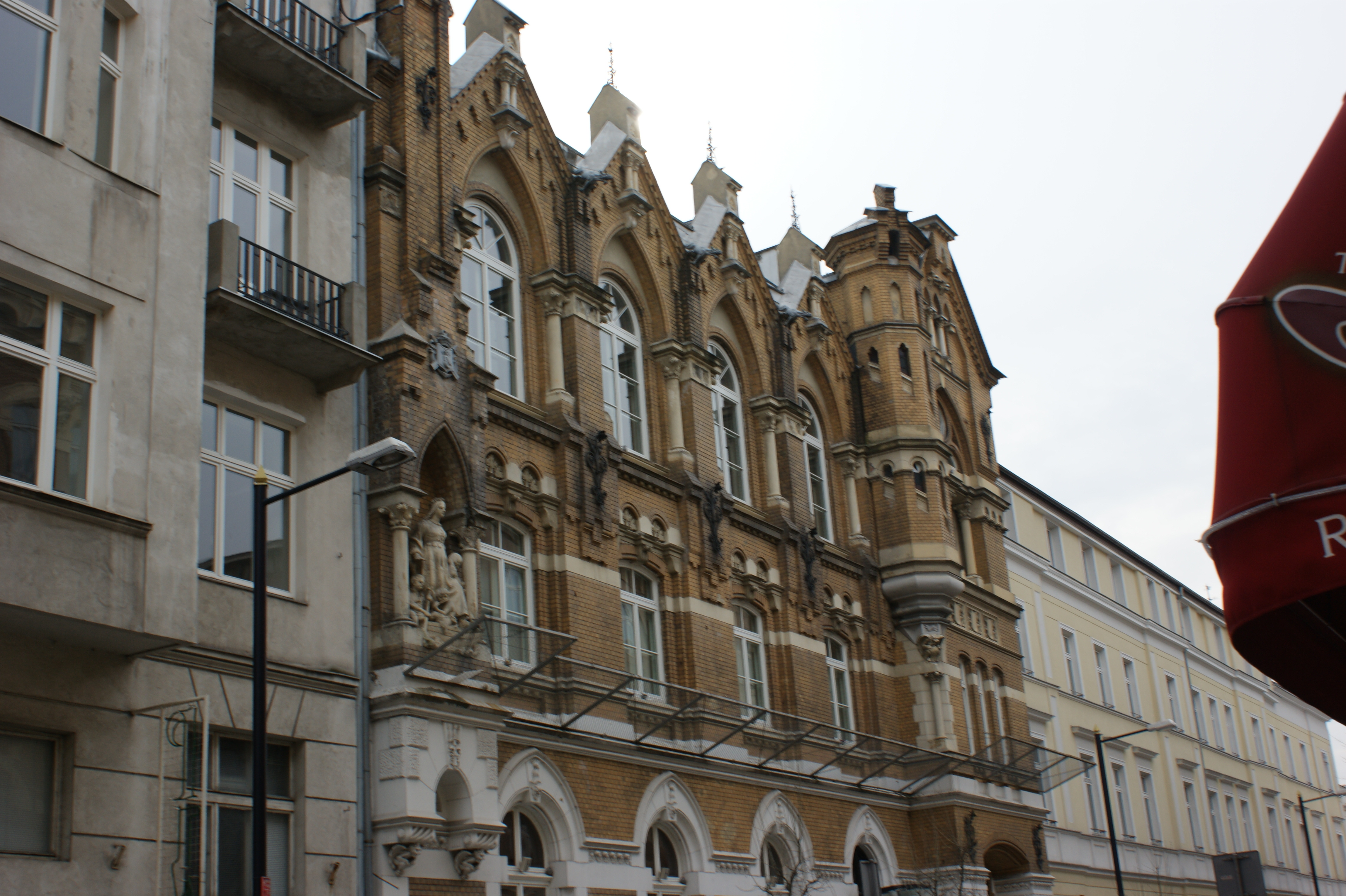 Gmach WTW